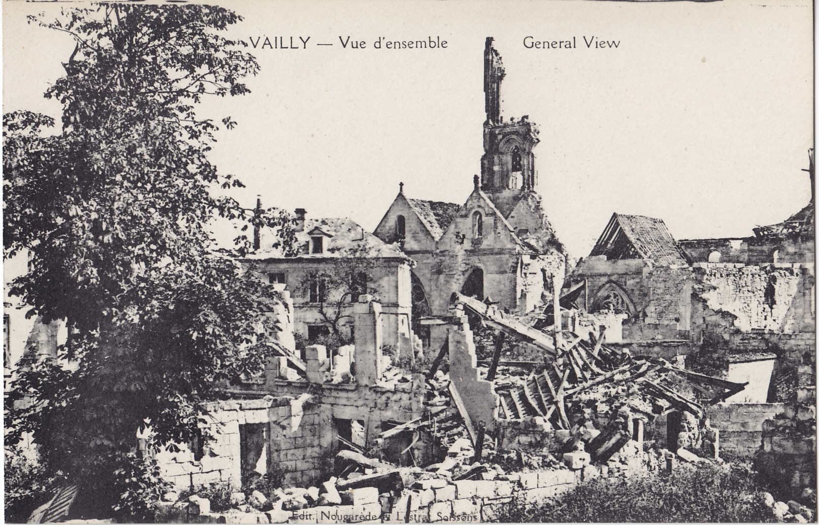 Carte postale ancienne éditée par B. Nougarède et H. Lestrat à Soissons :VAILLY - Vue d'ensemble